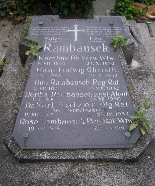 Else Rambausek Grabstätte